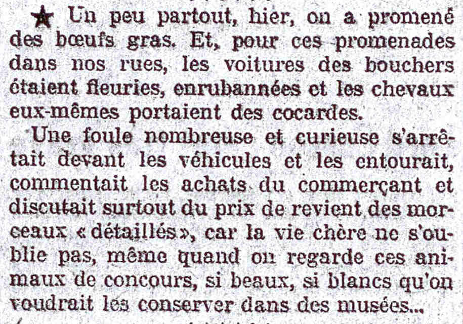 Promenades de bœufs gras le jeudi de la Mi-Carême 19 mars 1925.